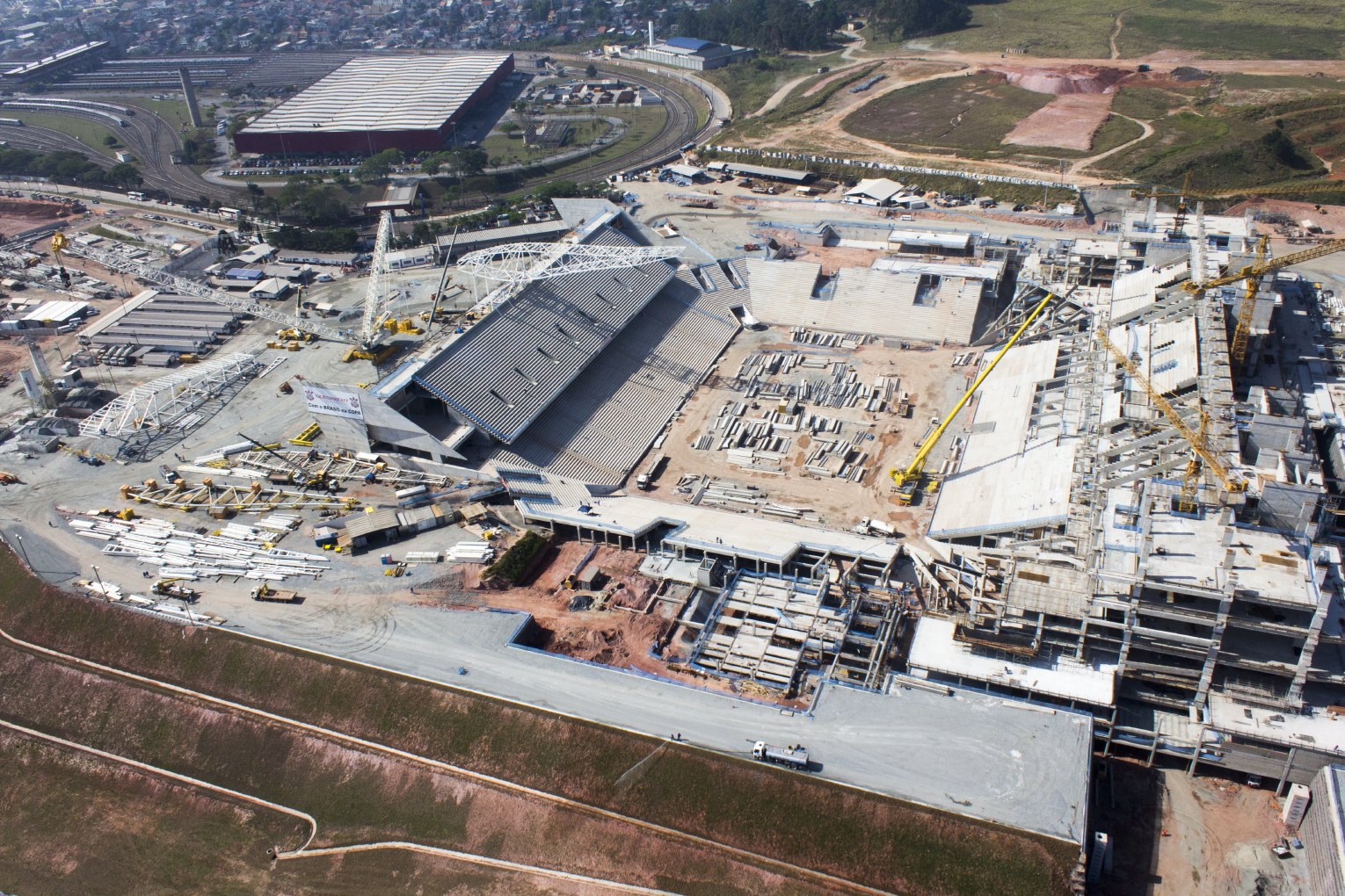 Novo estádio do Sport Club Corinthians Paulista, em São Paulo, Brasil